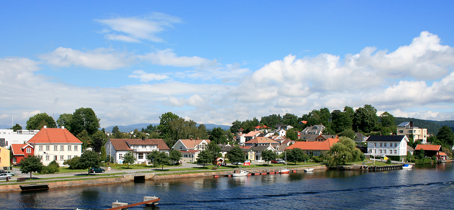 Vestsida, Porsgrunn, Norway.